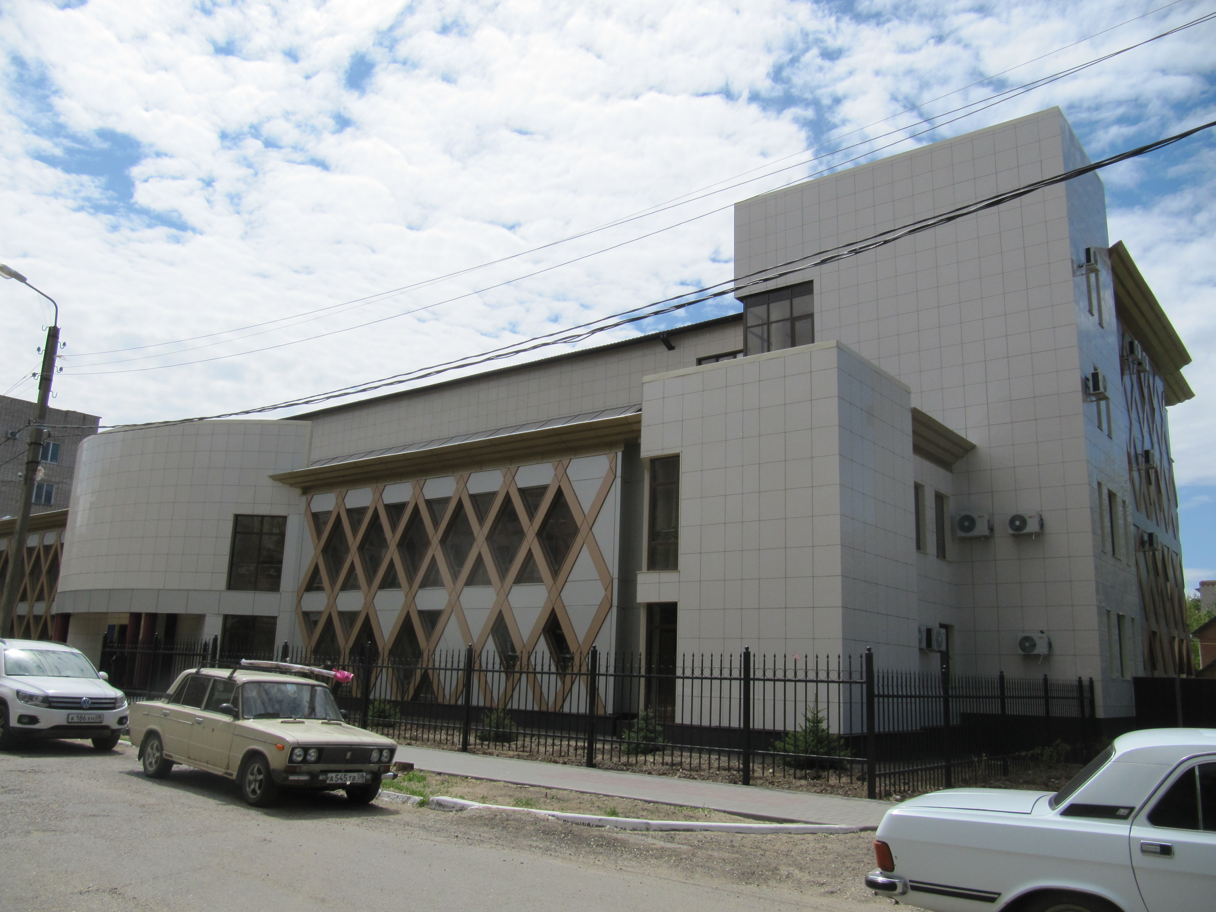 Здание Калмыцкого института гуманитарных исследований РАН